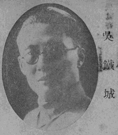 中文（台灣）: 民國名人圖鑑肖像